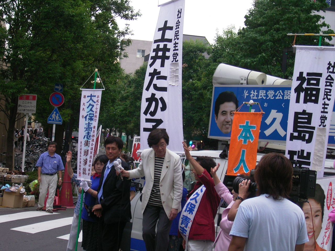 東京都議会議員選挙の応援に訪れた土井たか子。